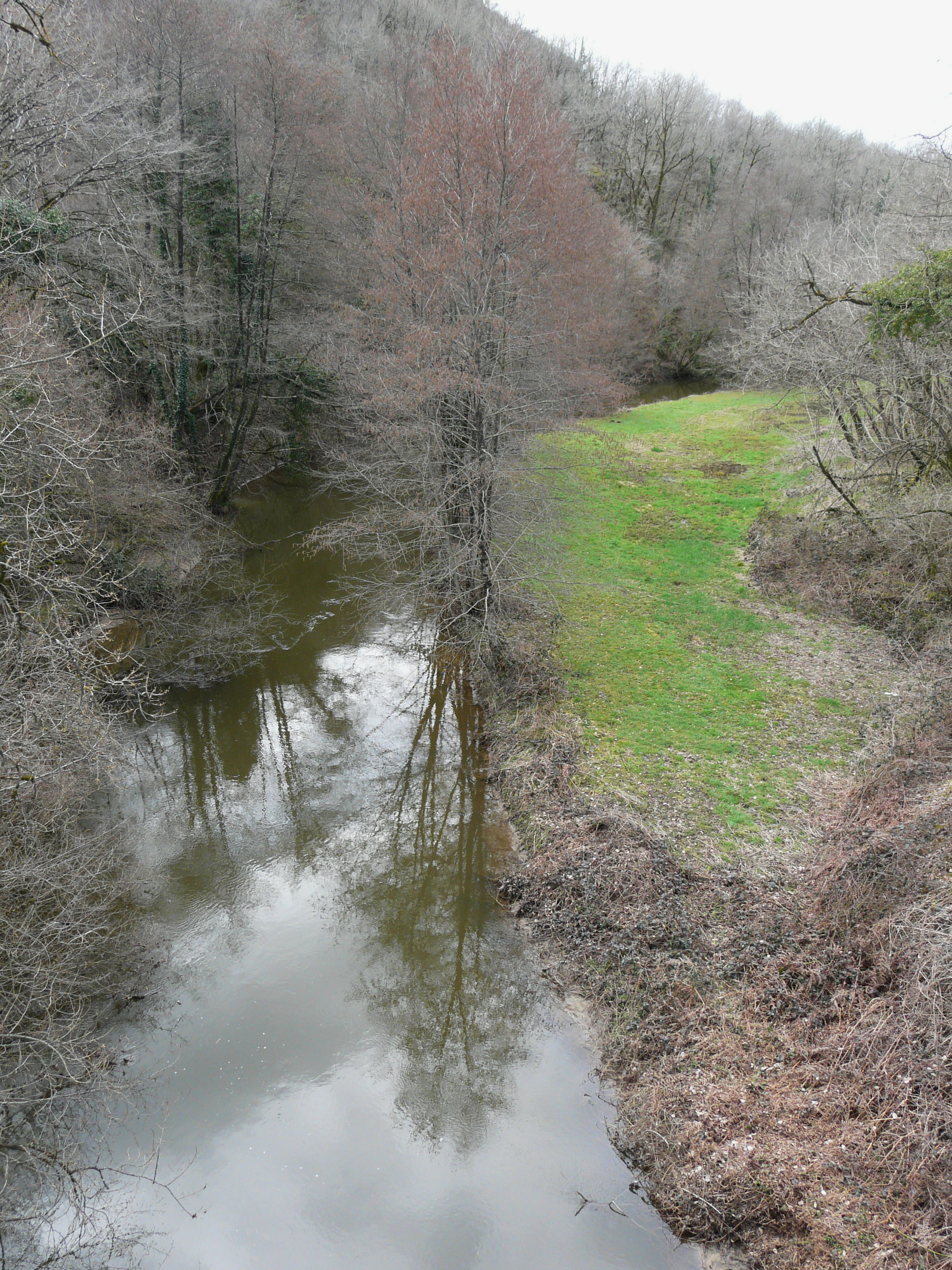 La Loue en aval du pont de la route départementale 707. Elle marque la limite entre les communes de Lanouaille (à gauche) et Dussac (à droite), Dordogne, France.